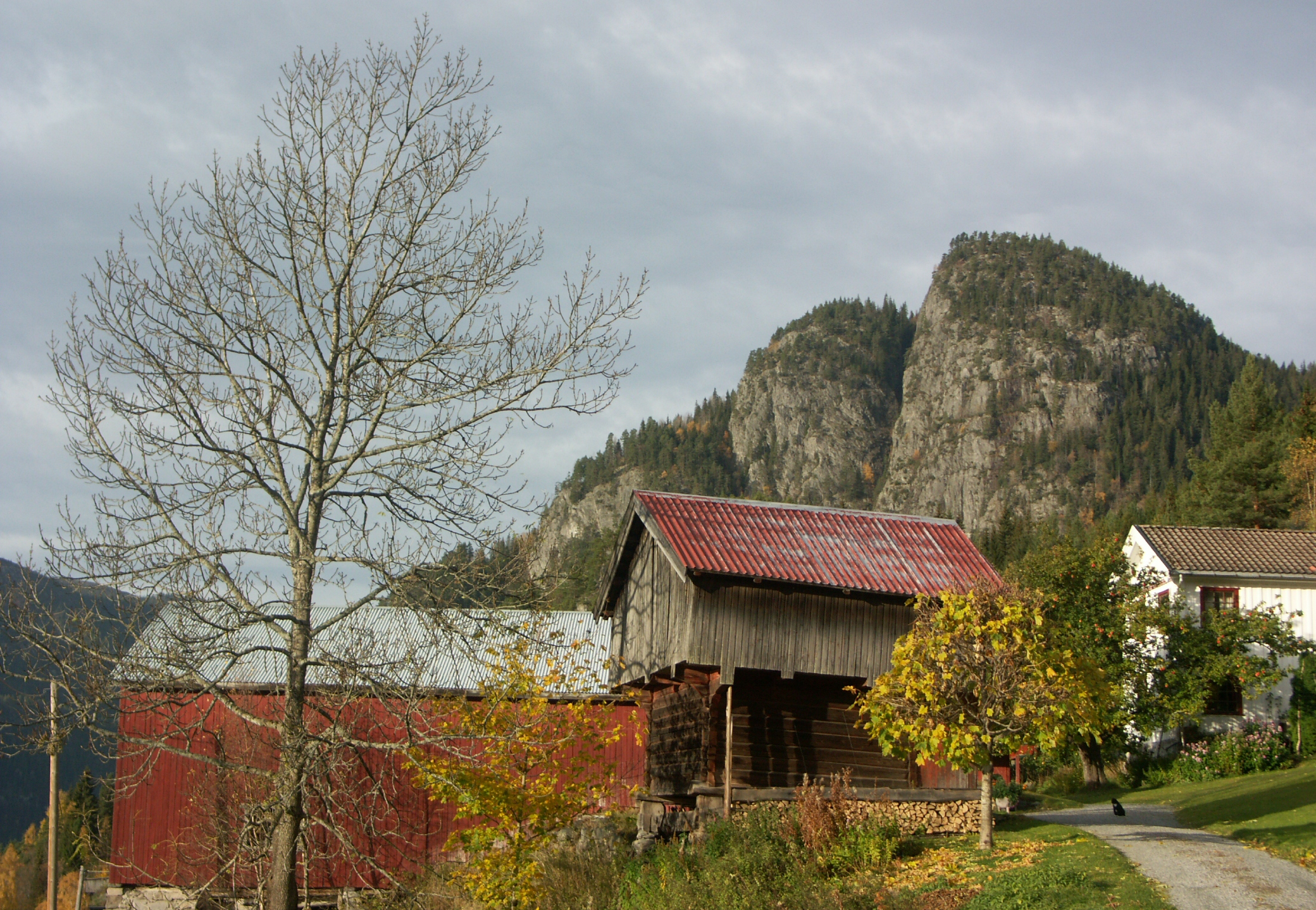 Seljord, Telemark, Norway